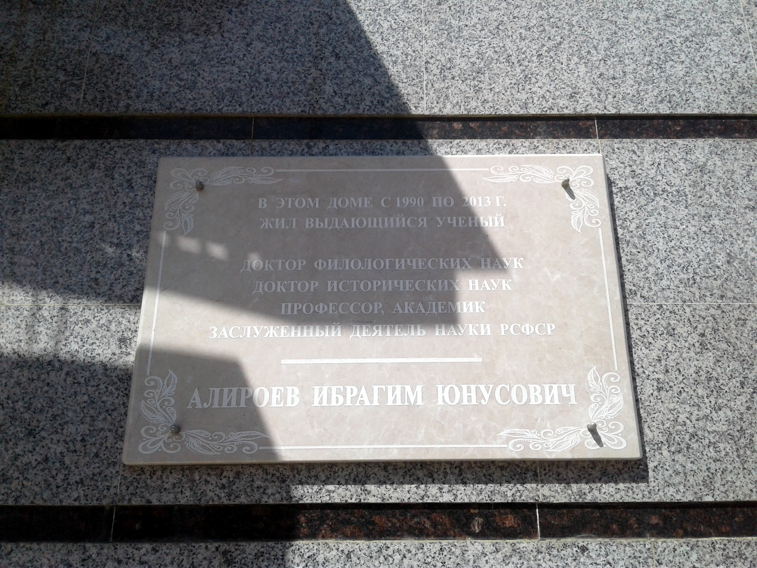 Грозный. Мемориальная доска на доме, в котором жил филолог и историк Ибрагим Алироев